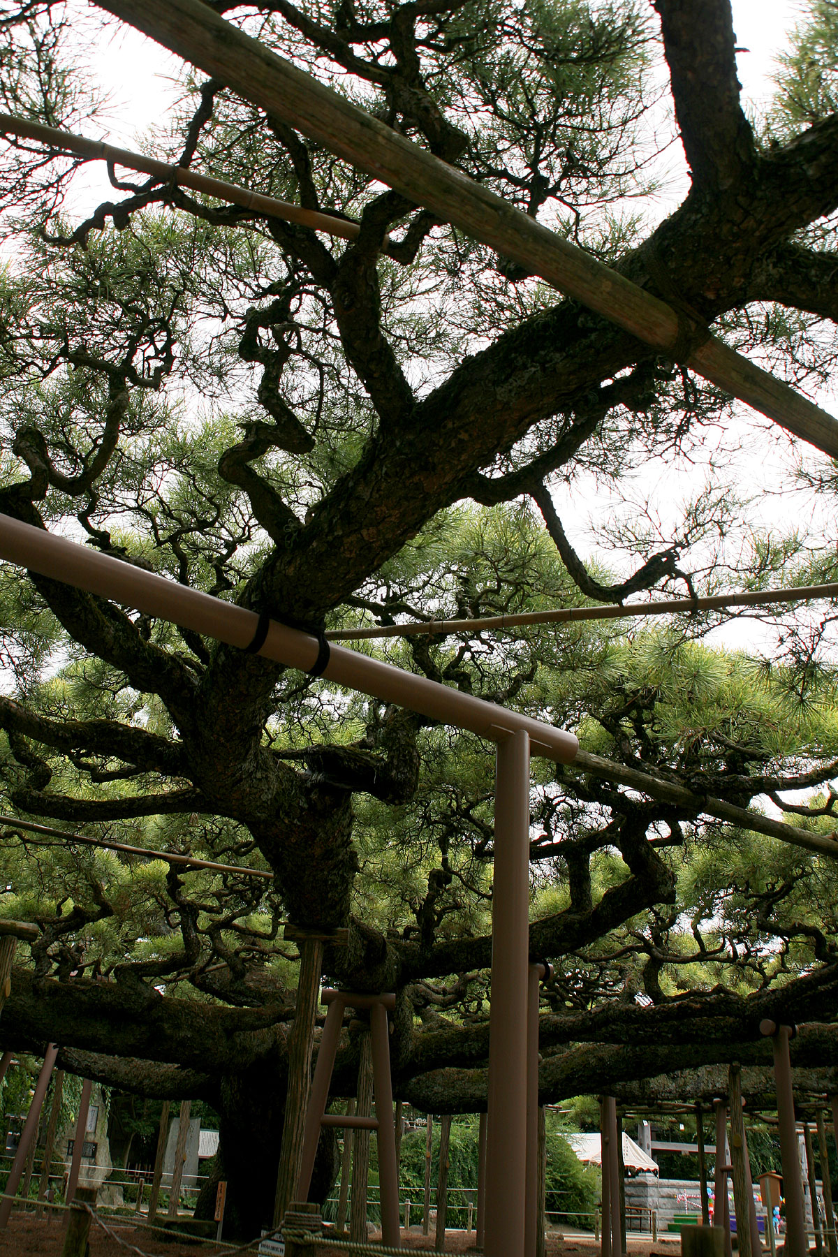 Aug. 23, 2008 江戸川区 影向のマツ (天然記念物)